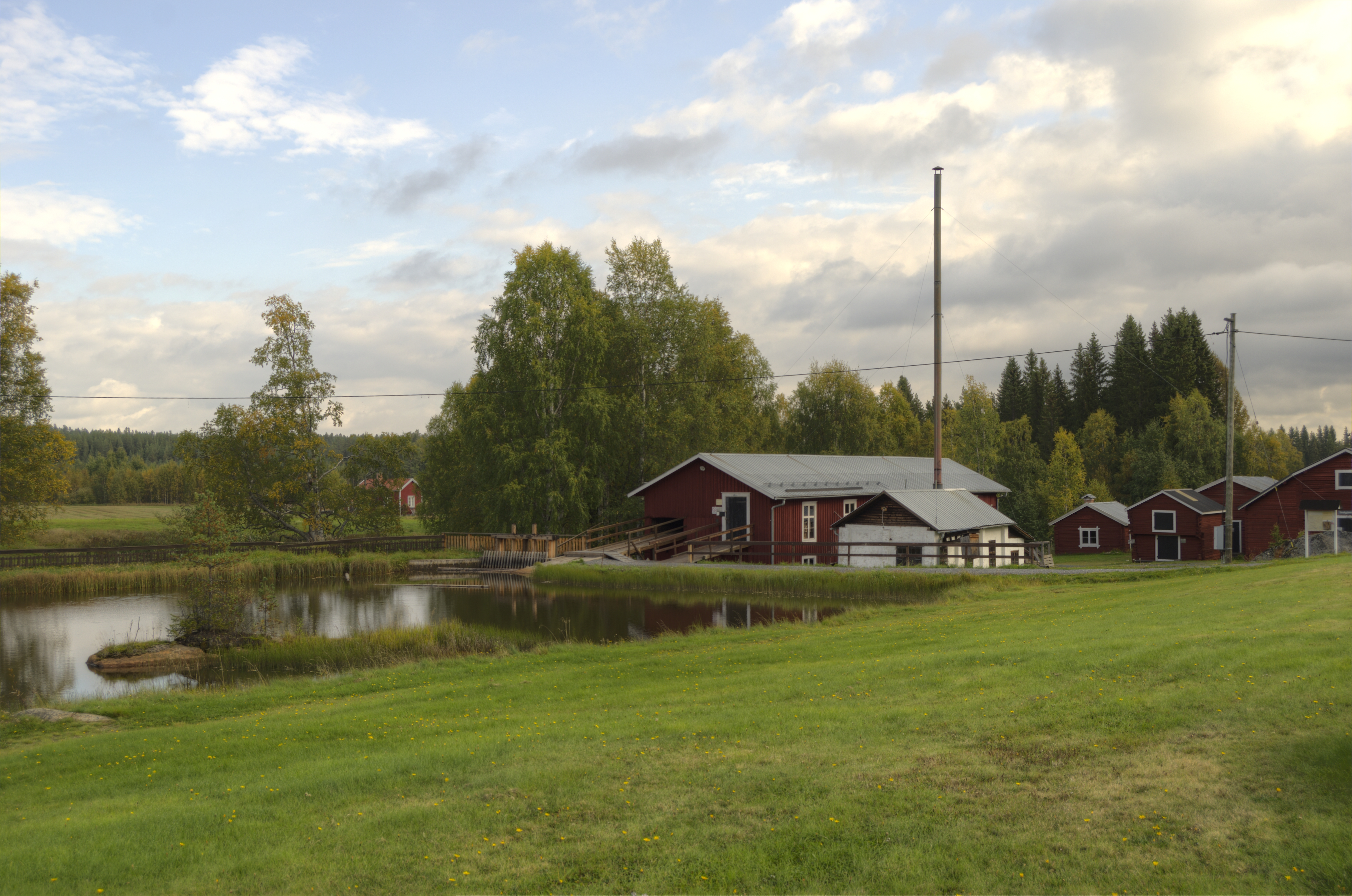 Drängsmarks vatten- och ångsåg (Drängsmark S:4 (Samfälld mark till Drängsmarks by))